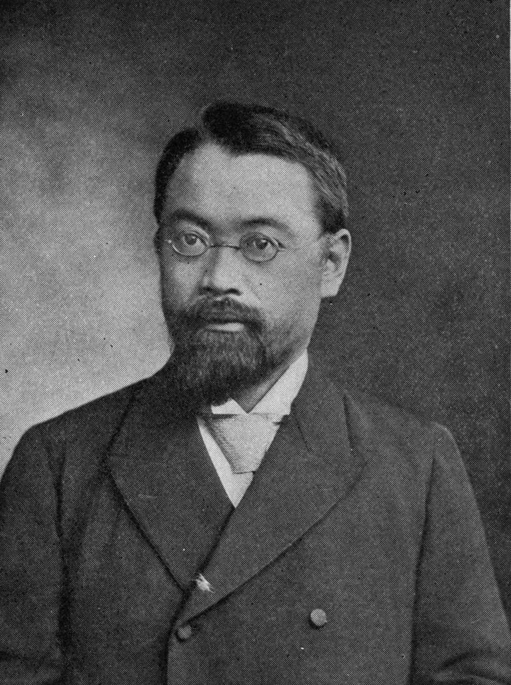 Portrait de Kakichi Mitsukuri (1857-1909)